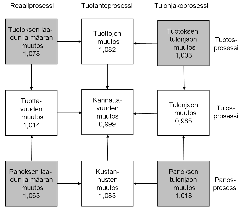 Muuttujat ja tunnusluvut